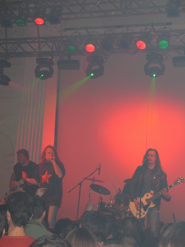 KUD Idijoti, Belgrade SKC